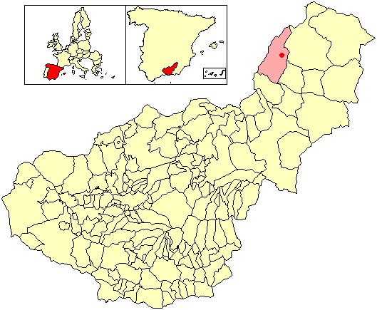 Situación de la localidad de Corralón (en el municipio de Castril) respecto a la provincia de Granada, en España.